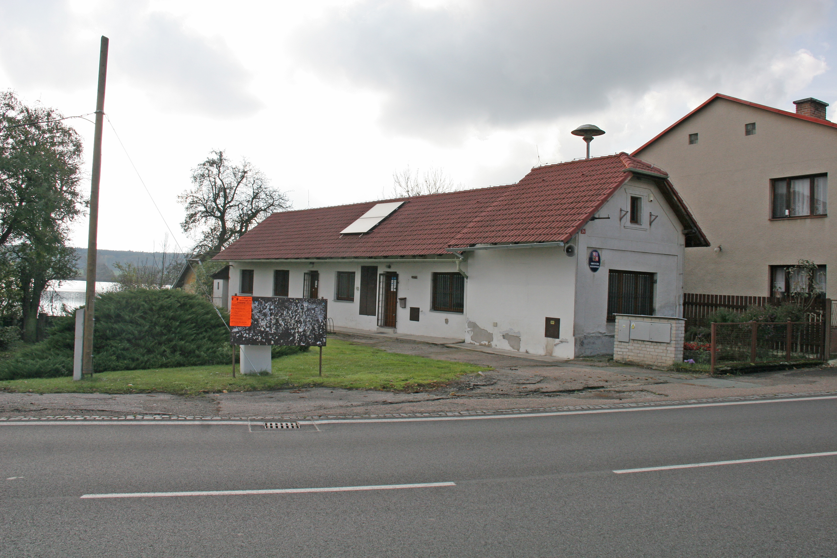 Dlouhopolsko obecní úřad